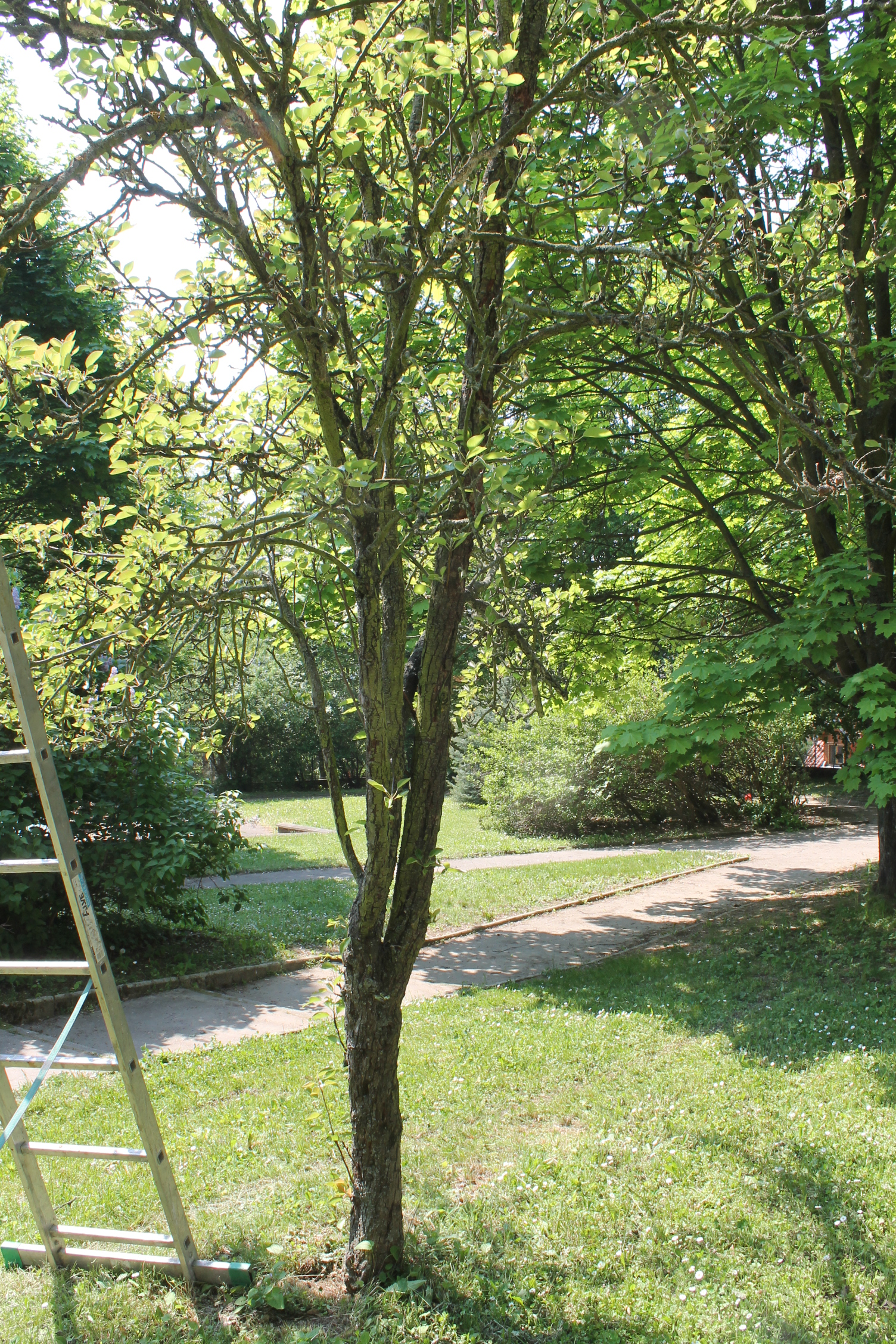 Hrušeň , Brno Komín